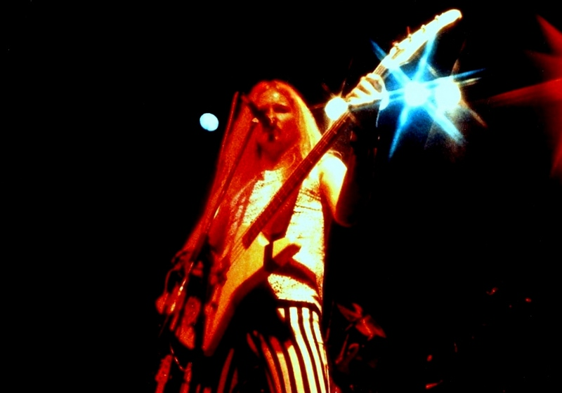 Ricky van Helden (Live)